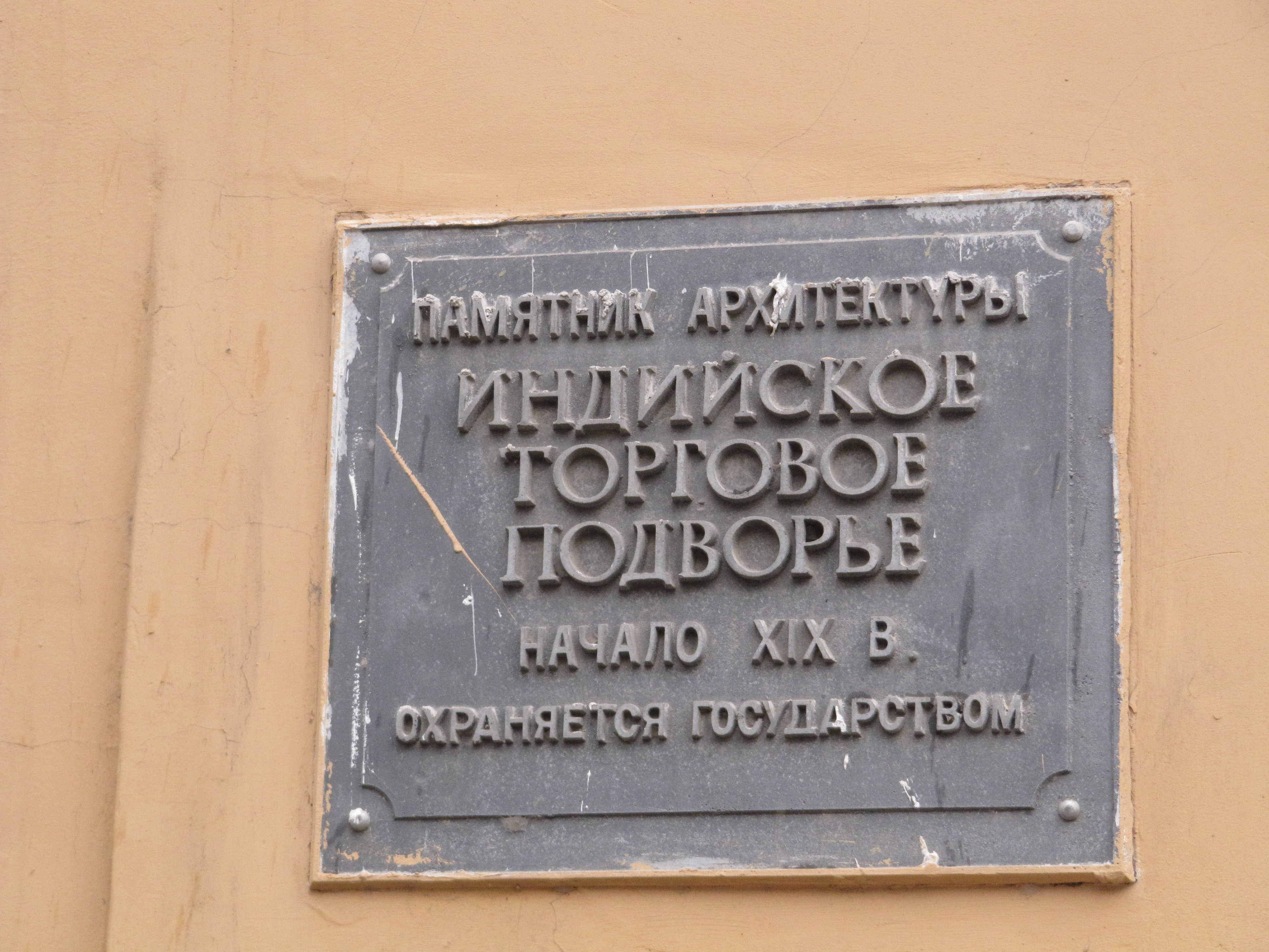 Индийское торговое подворье, Астрахань